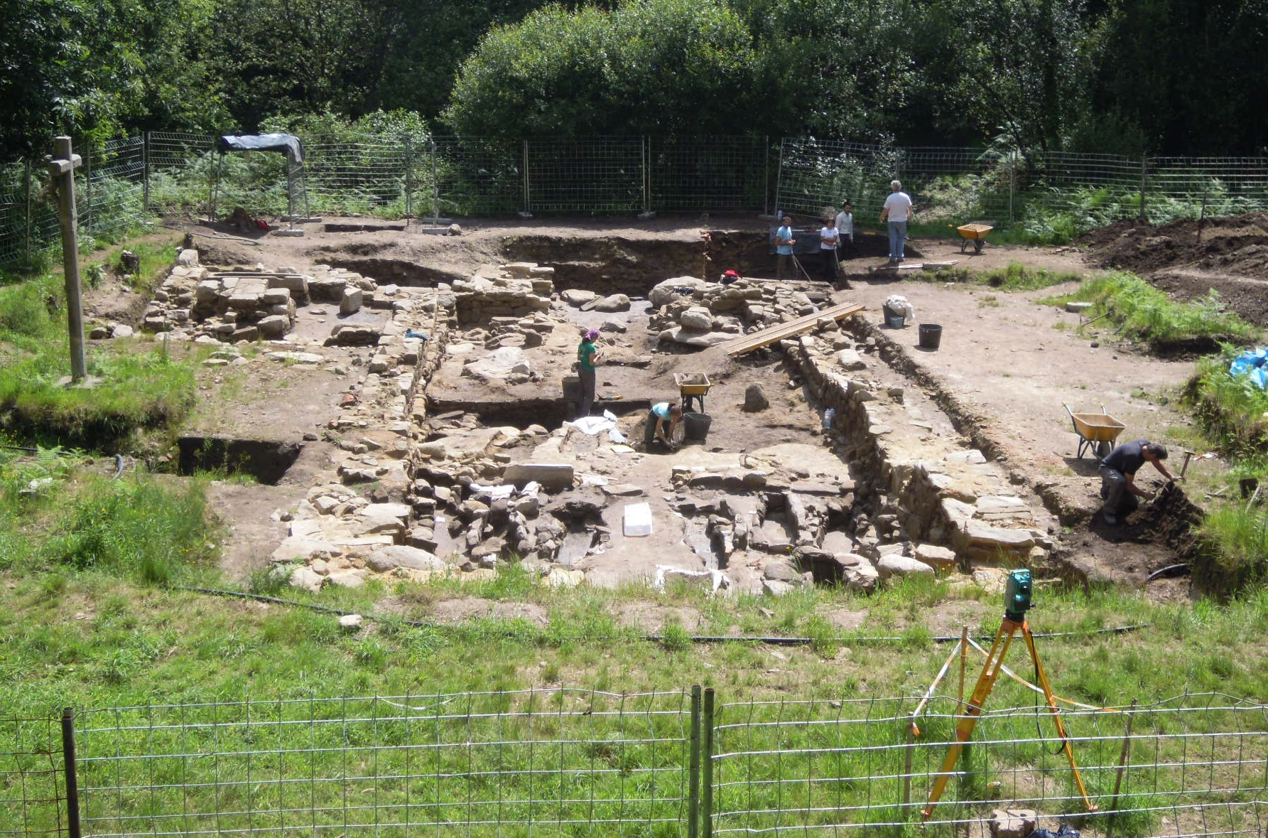 Fouilles arquéologiques de "Igrexa vella de Santa Comba de Louro", temple du IIIe siècle, dans la commune de Valga province de Pontevedra (Espagne)